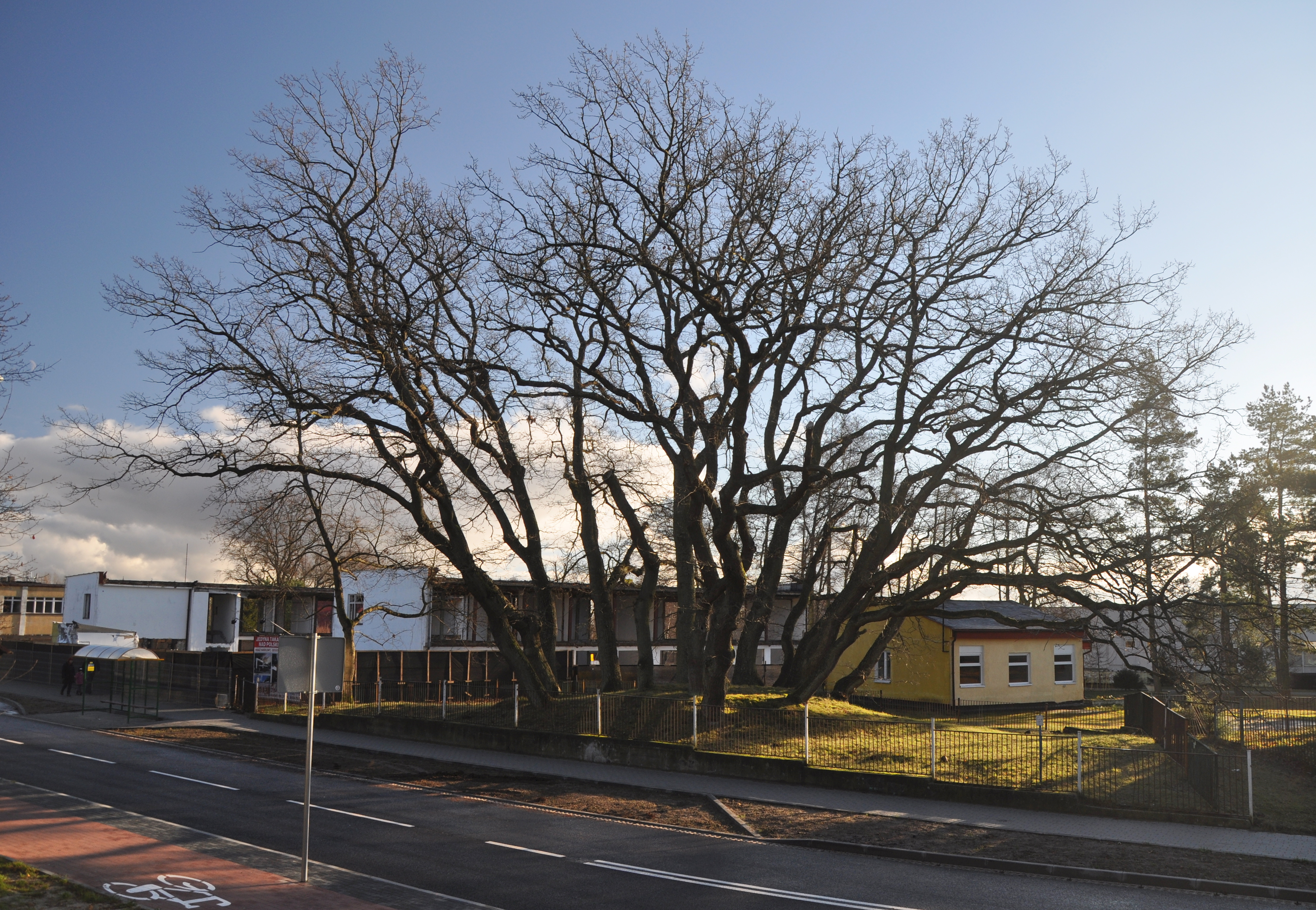 Grupa dębów szypułkowych (pomniki przyrody) w Dźwirzynie – ujęcie na południową grupę drzew przy ul. Wyzwolenia 8, od strony północno-zachodniej